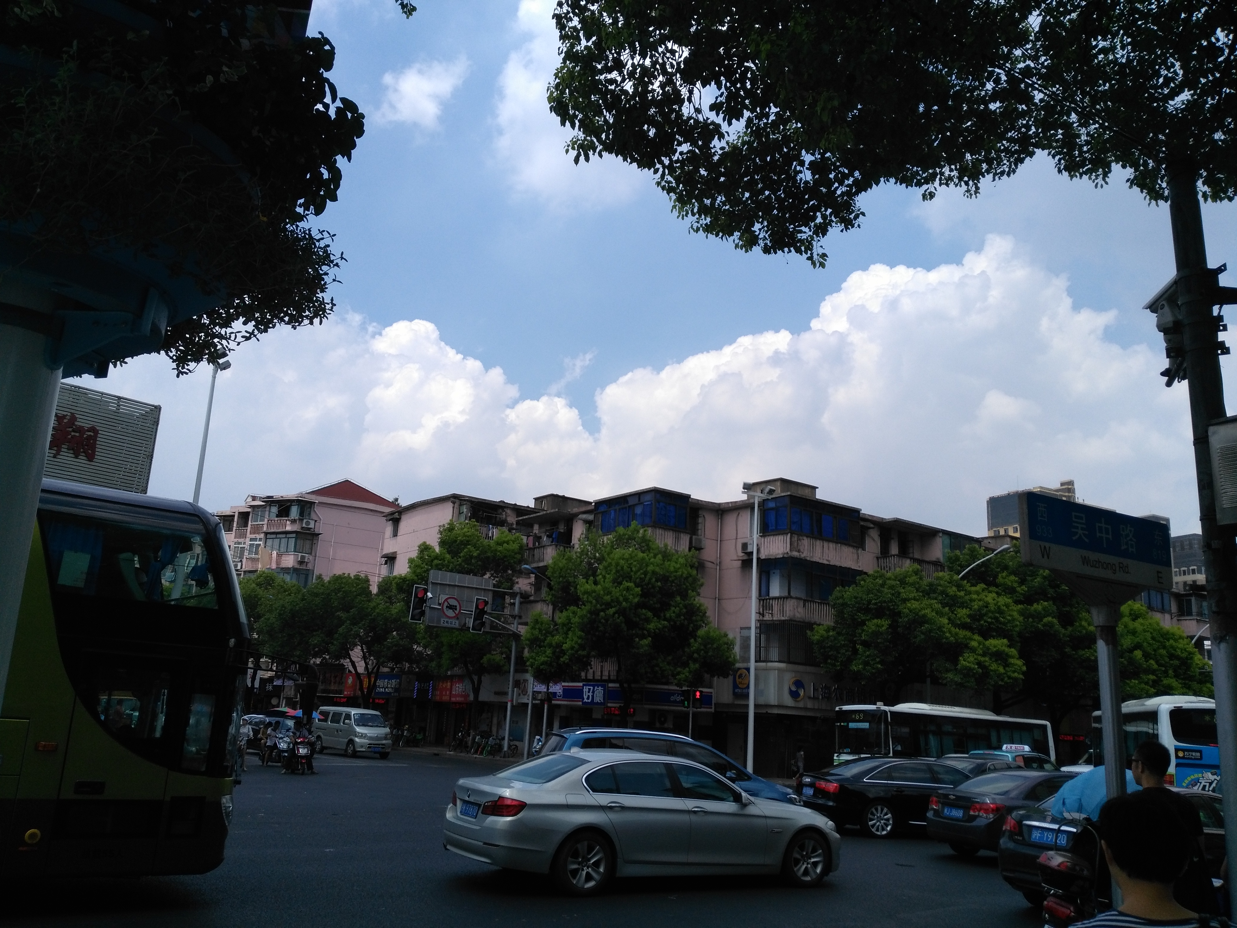 中文（中国大陆）: 站在虹桥镇人民政府原址拍摄虹桥镇的虹梅路/吴中路路口